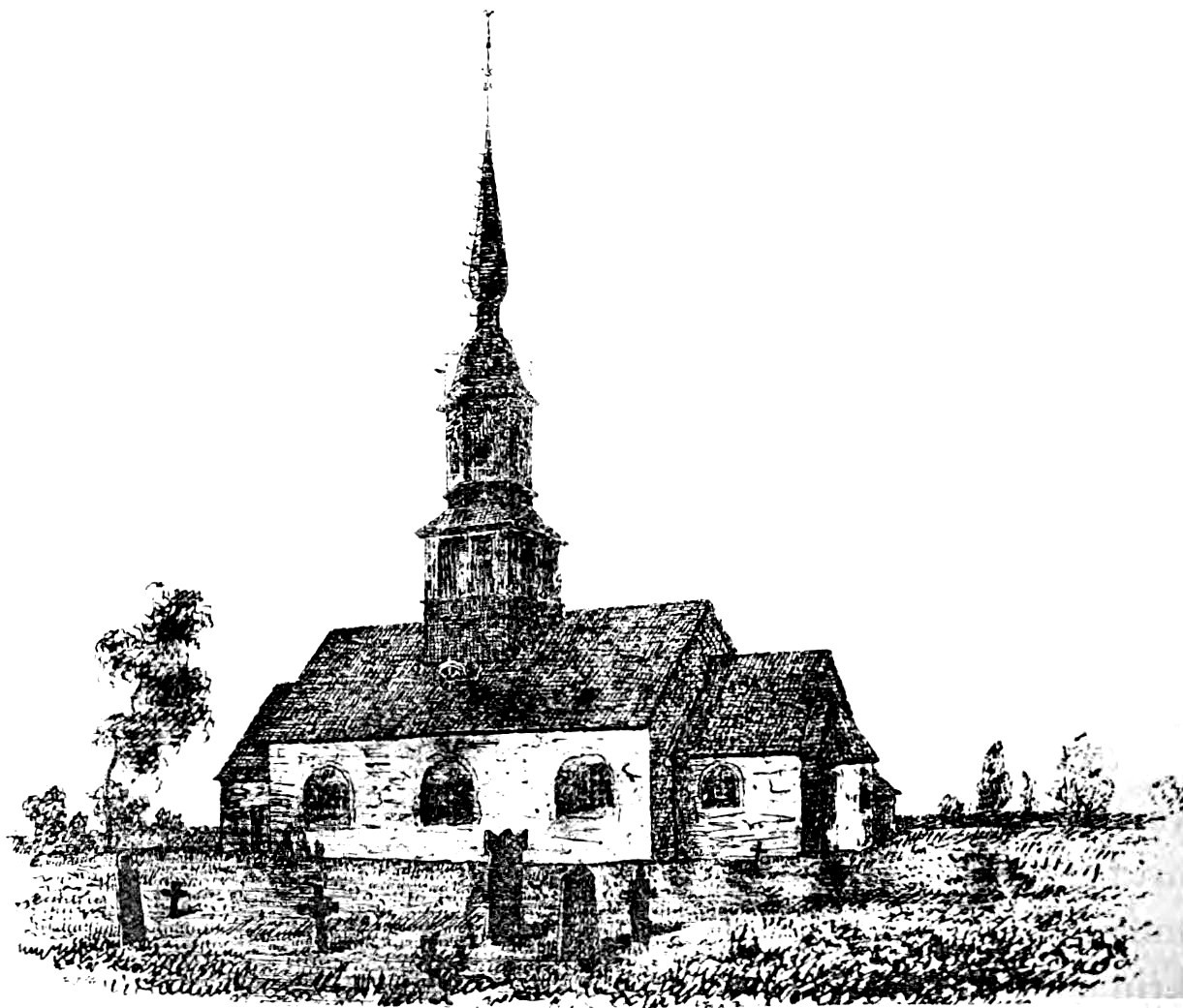 Björkebergs kyrka i Östergötland. Teckning i "Utdrag af Antiqvitets-Intendenten P. A. Säves afgifna berättelse för år 1861", publicerad i Antiqvarisk tidskrift för Sverige band 1, 1864.